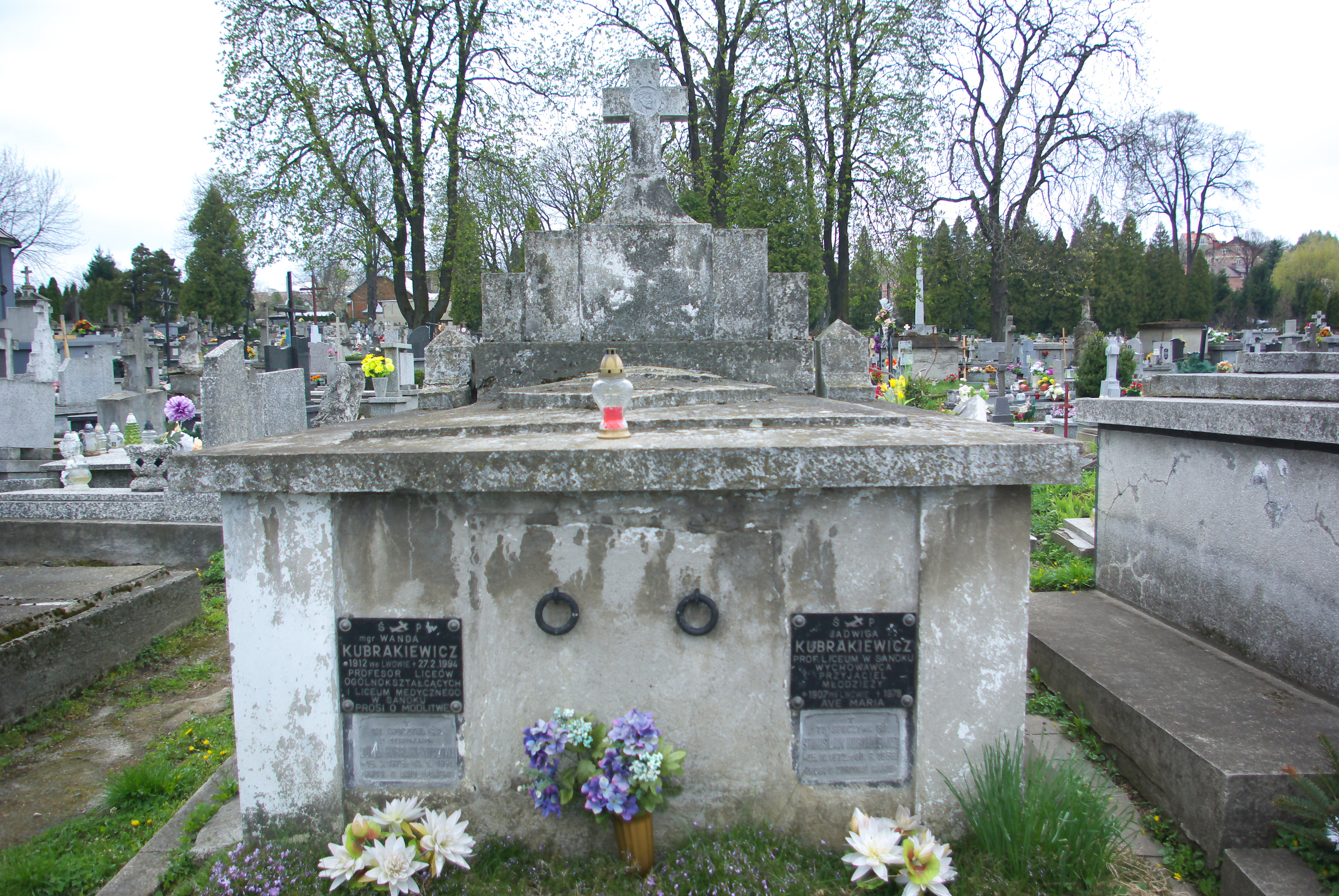 Grobowiec rodziny Kubrakiewiczów oraz Bończa Rutkowskich na Cmentarzu Centralnym w Sanoku.